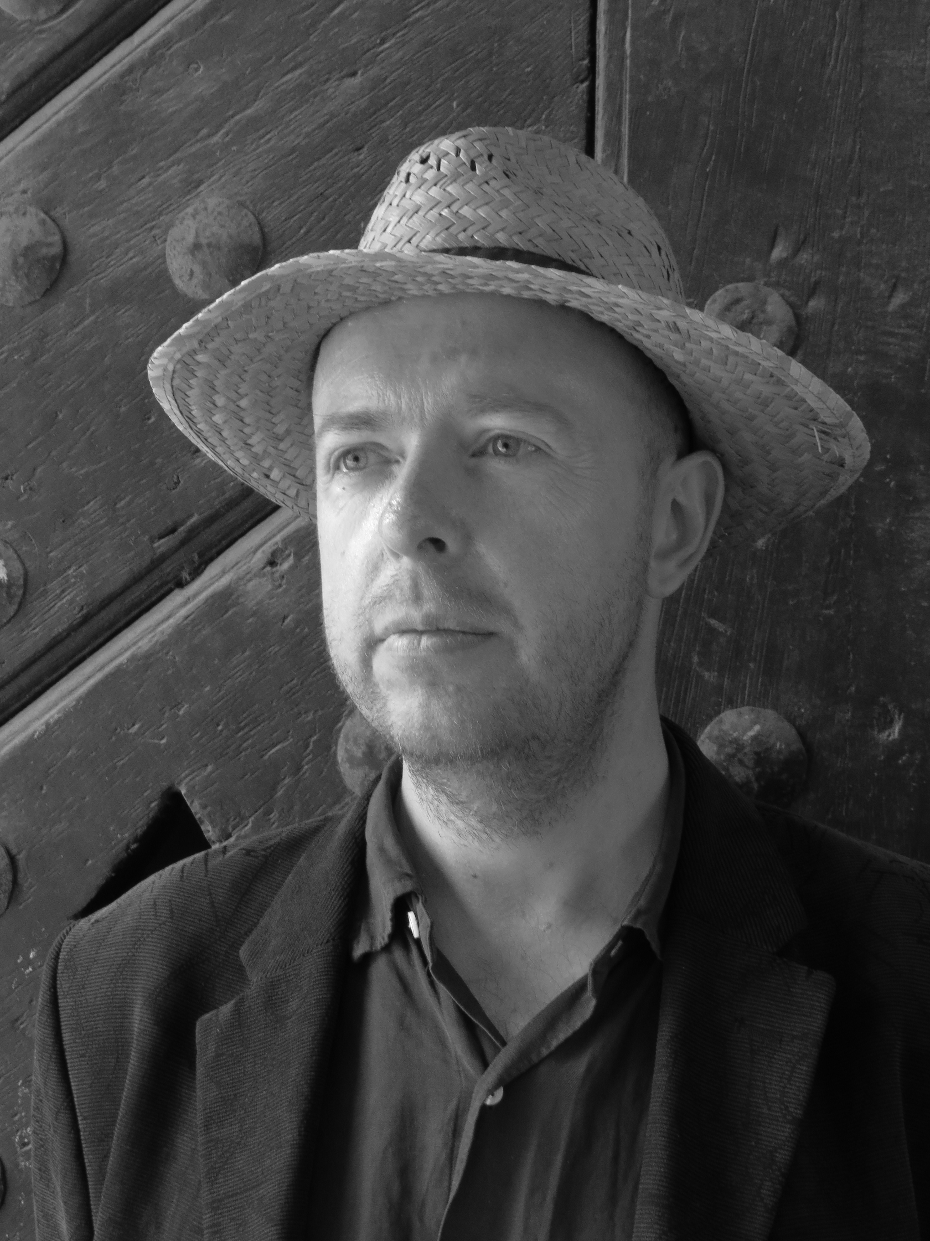 Portrét Martina C. Putny od Hany Rysové